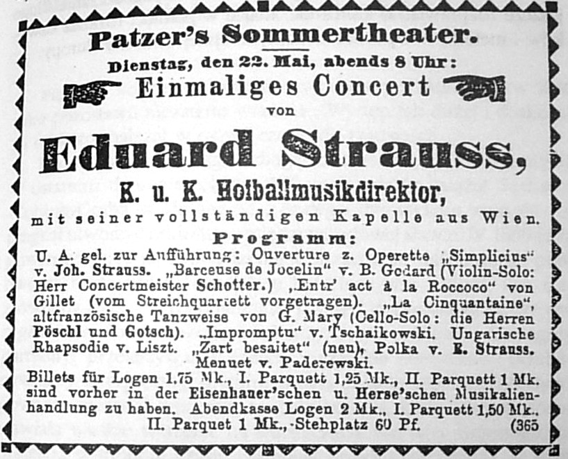 Anons o koncercie wiedeńskiej orkiestry Johanna Straussa pod batutą Eduarda Straussa w 1900 r. w Bydgoszczy - Bromberger Zeitung 18-05-1900